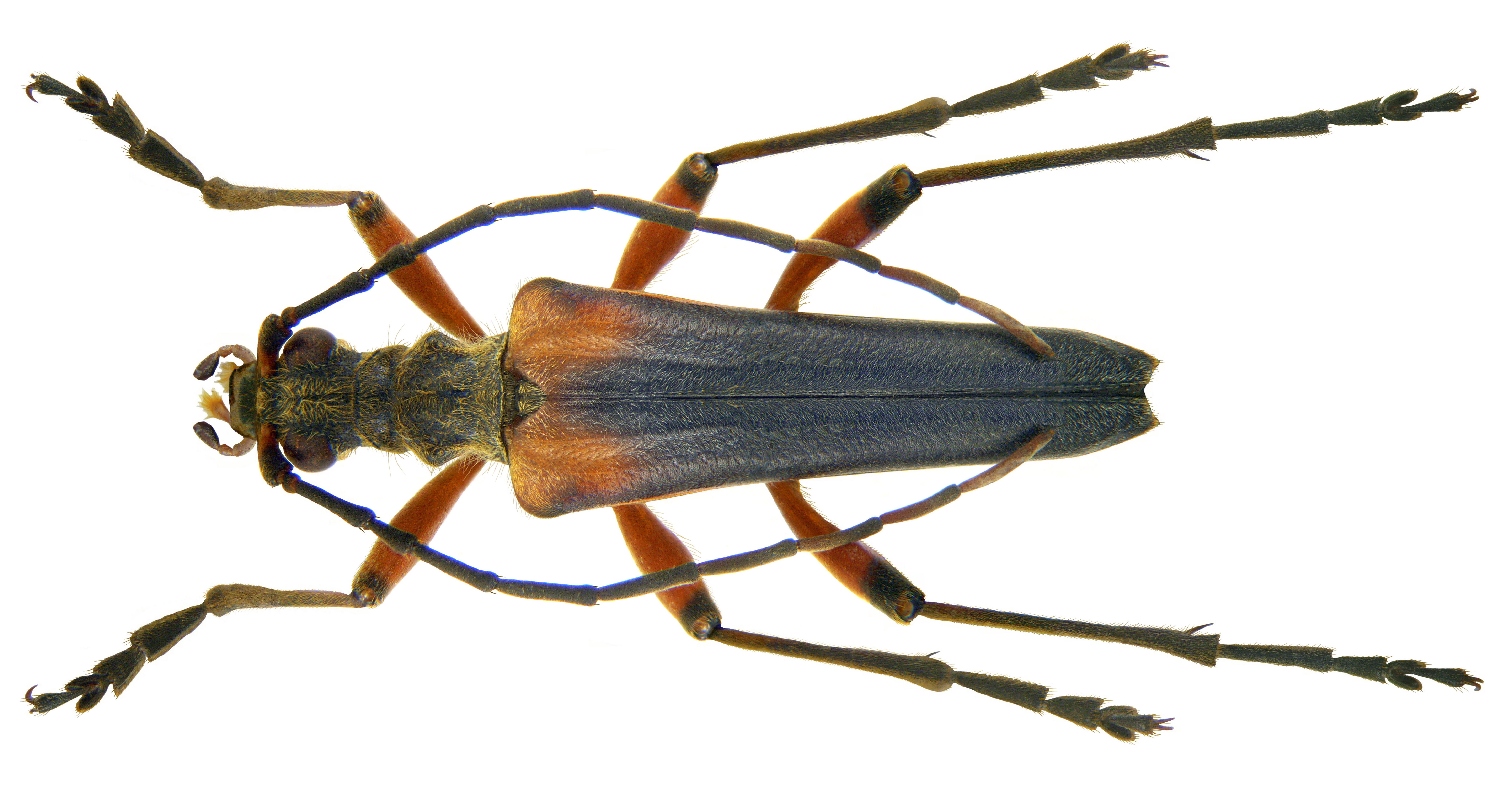 Familie: Cerambycidae Groesse: 15-25 mm Verbreitung: Europa Ökologie: Entwicklung in kranken Laubbäumen Fundort: Germania, Bayern, Unterfranken, Würgau leg.det. U.Schmidt, 1972 Foto: U.Schmidt, 2009